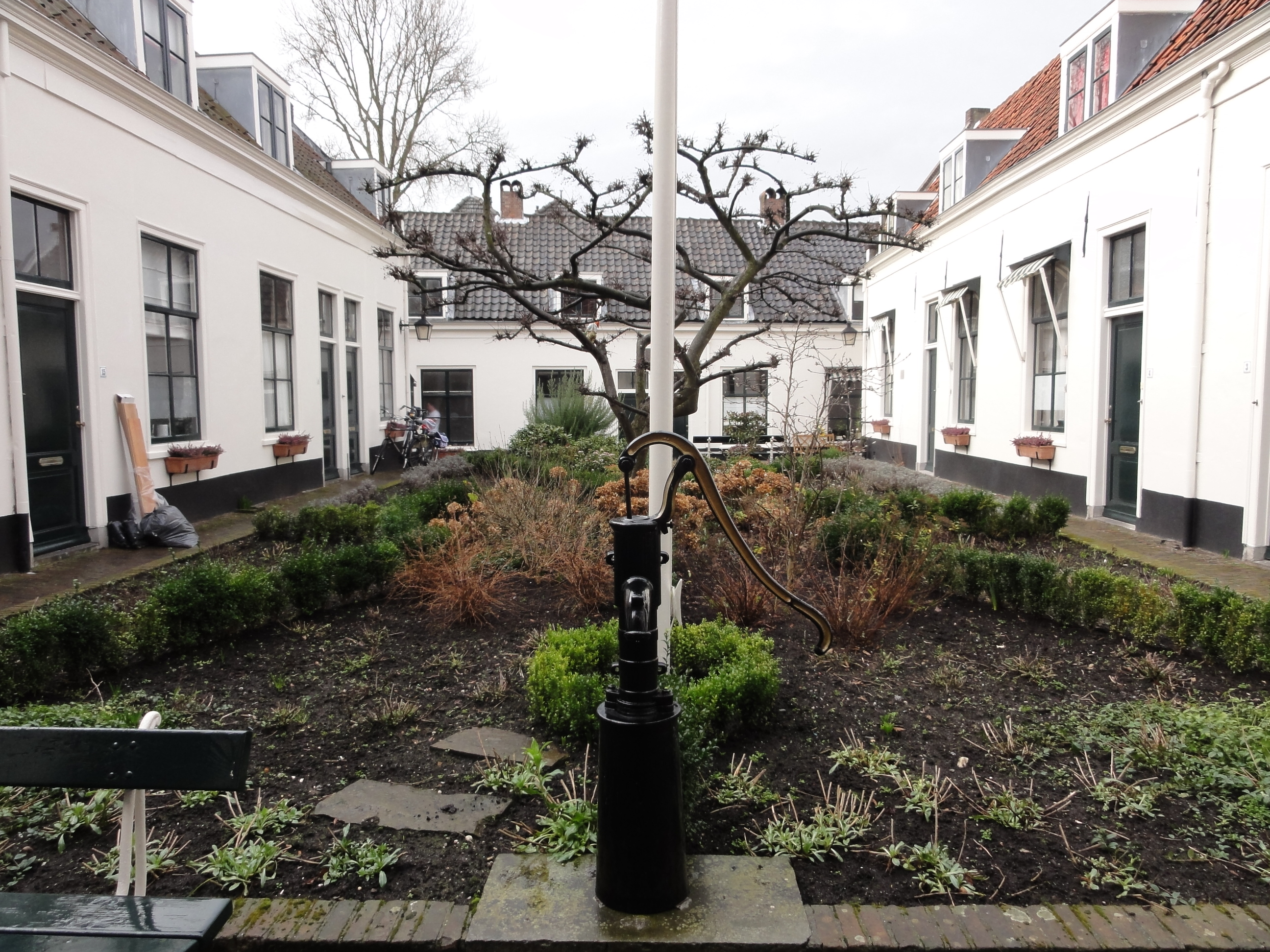 St. Jacobs- of Crayenboshofje aan de Doezastraat 25 te Leiden